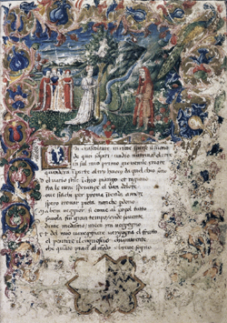 François Pétrarque (1304-1374) - « Rime » Trionfi, Manuscrit du XVe siècle (Bibliothèque nationale, Rome)